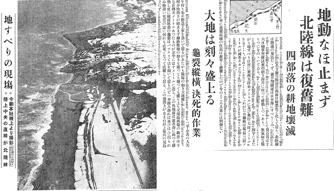 1934年（昭和9年）2月16日、北陸本線筒石駅附近において起った地すべりを写した空中写真並びにその被害に関する詳報